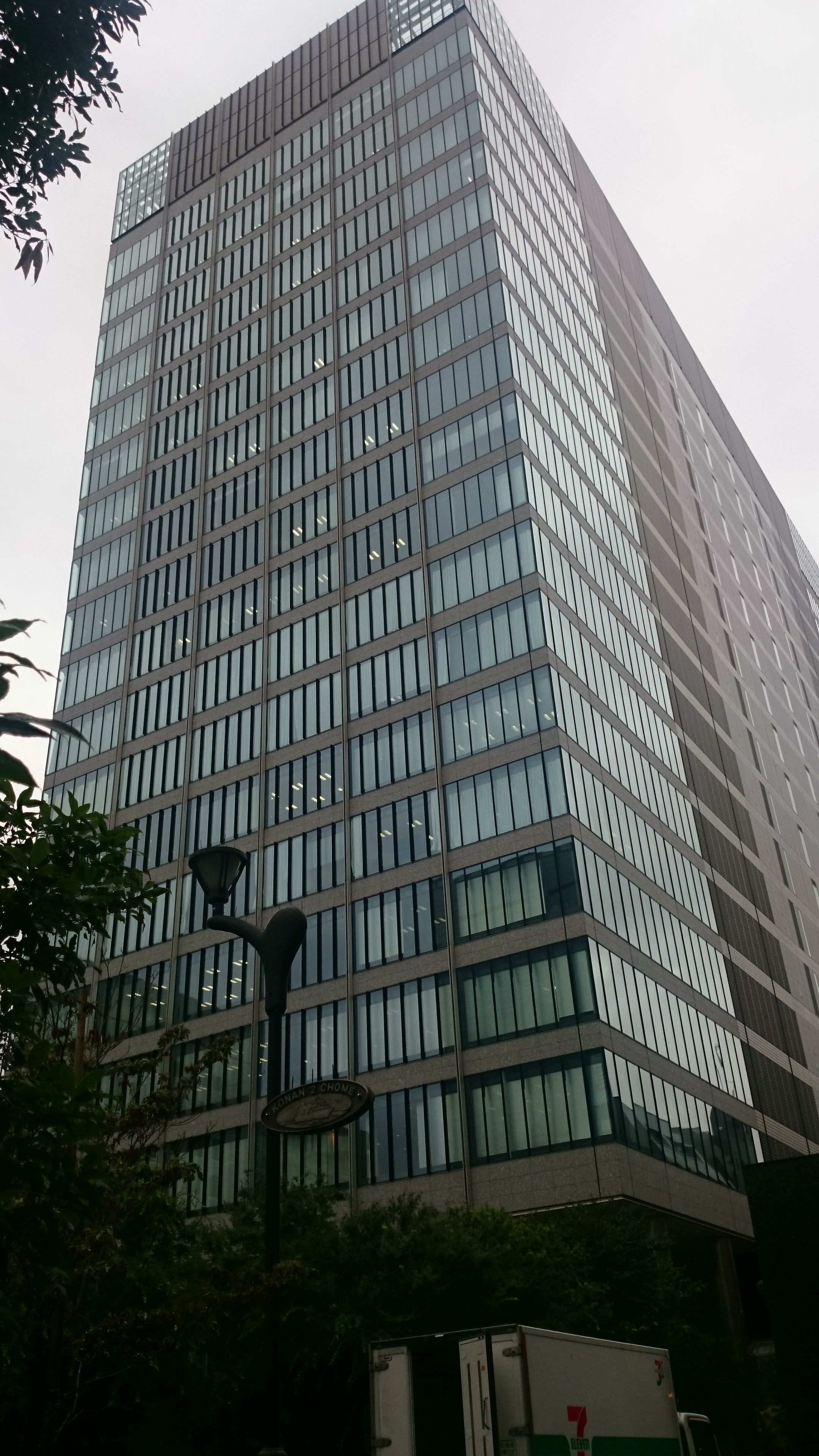 品川フロントビルには豊田通商株式会社の東京本社、並びに豊通グループの本支店が入居している。